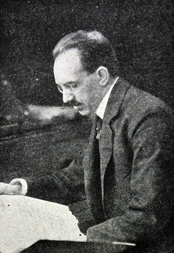 Bruno Seidler-Winkler, Komponist